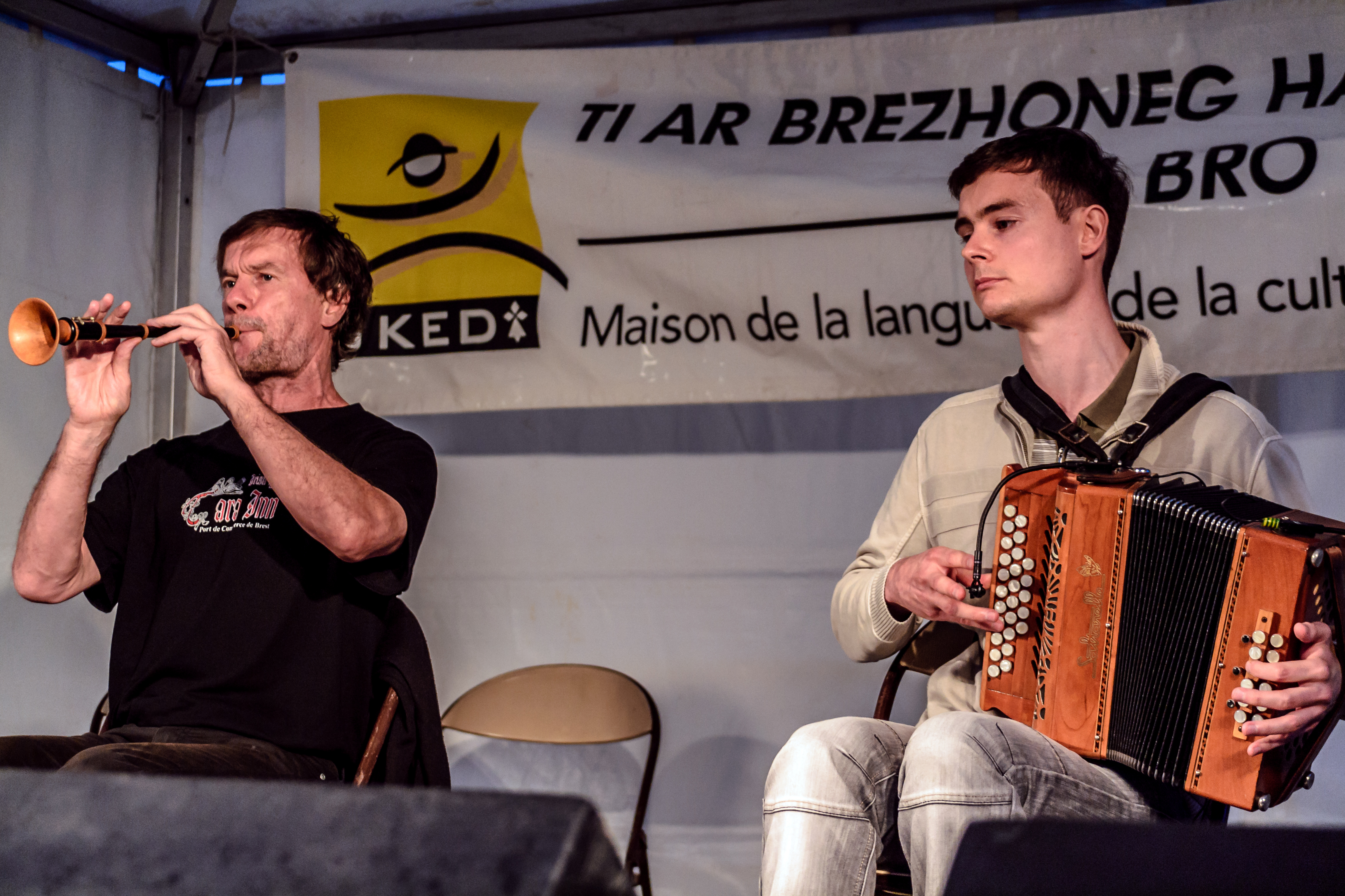 Didier Mahe et Romain Kergoat, duo de fest-noz, lors de la fête de la musique le 21 juin 2016 à Brest, bas de rue de Siam.